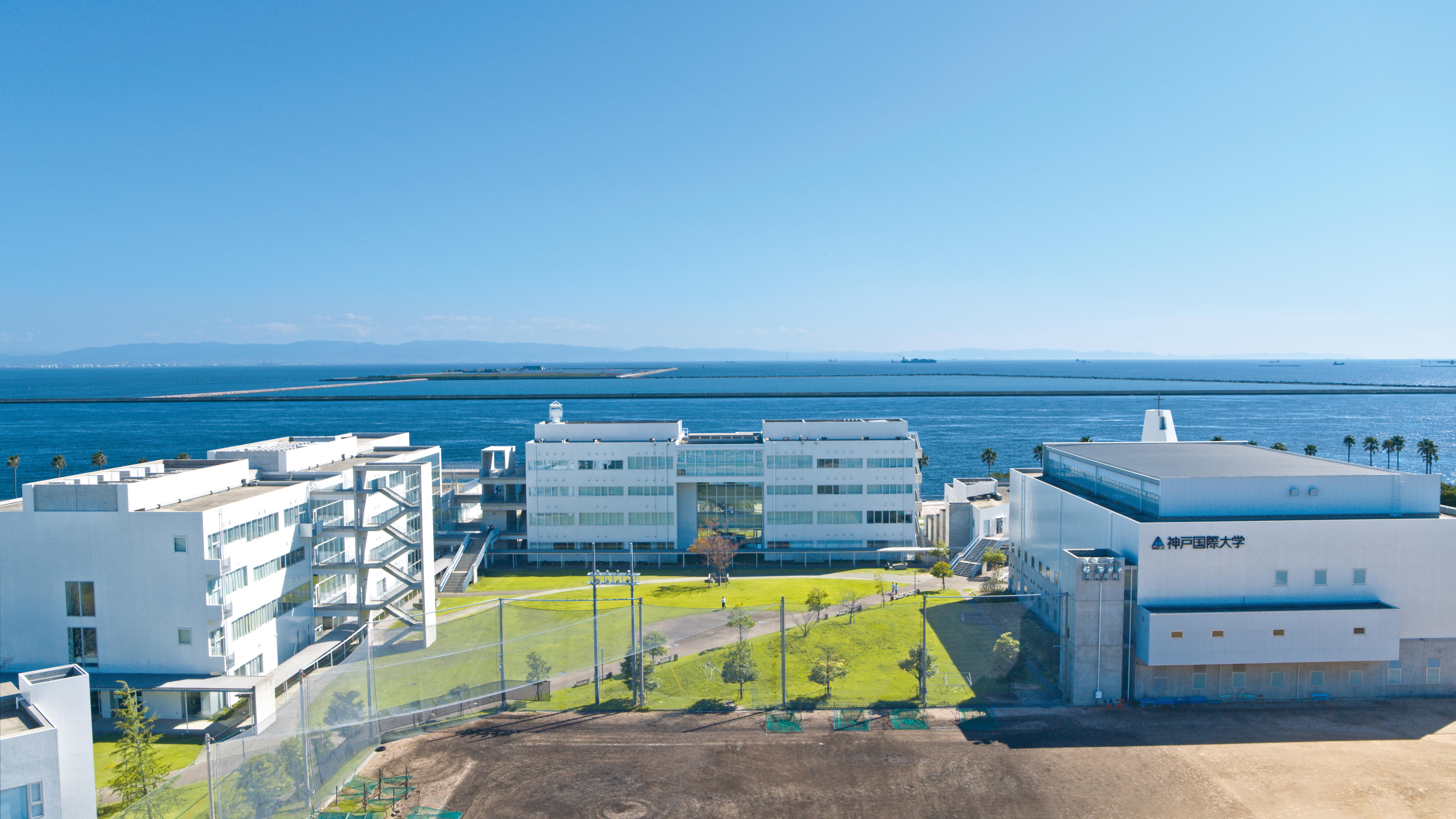 神戸国際大学をドローンで撮影しました。